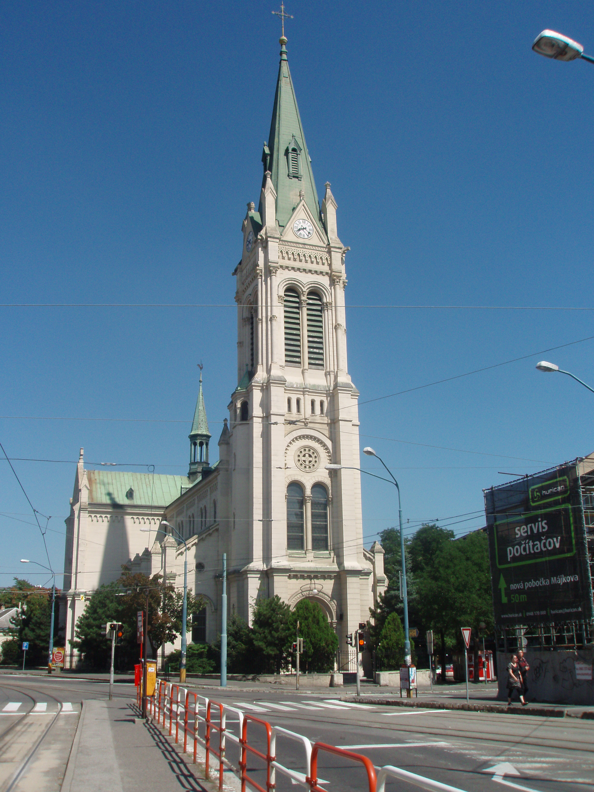 Blumental crkva